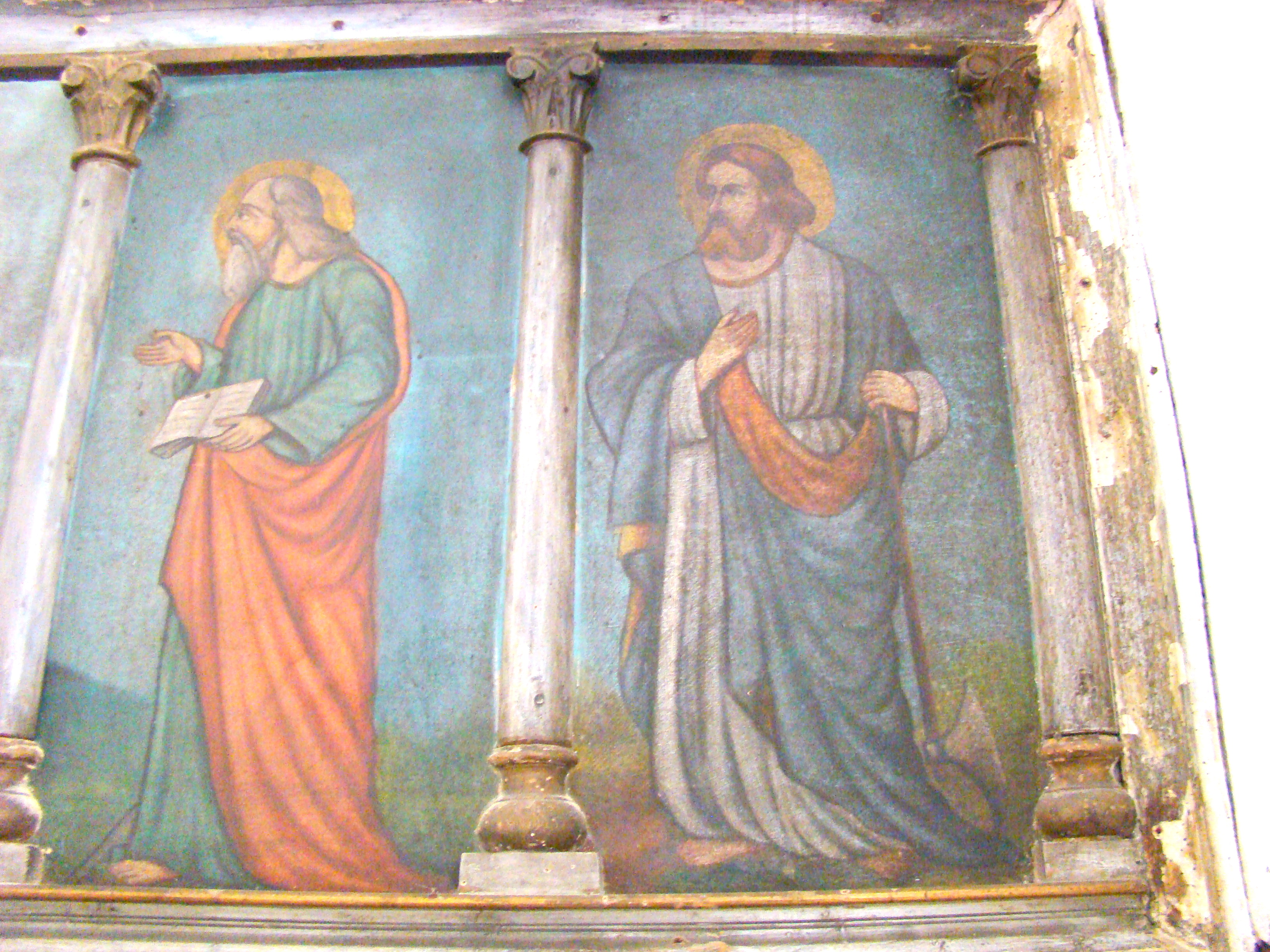 Biserica "Adormirea Maicii Domnului" a mănăstirii Vadului , sat Vad, județul Cluj